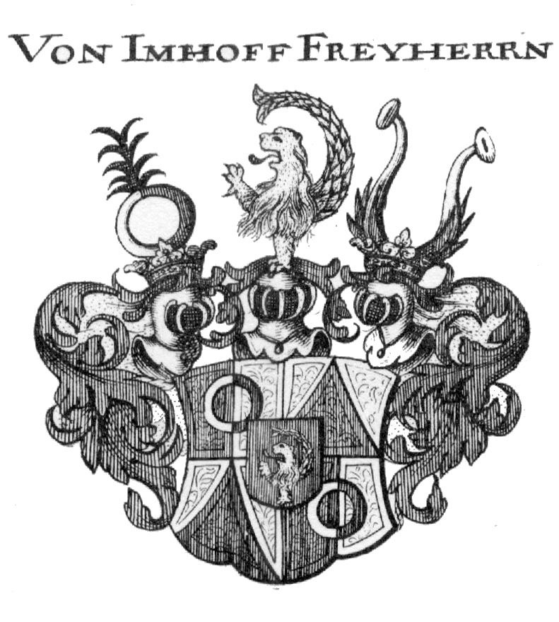 Wappen der Augsburger und Nürnberger Adels- und Patrizierfamilie der Freiherren von Imhoff